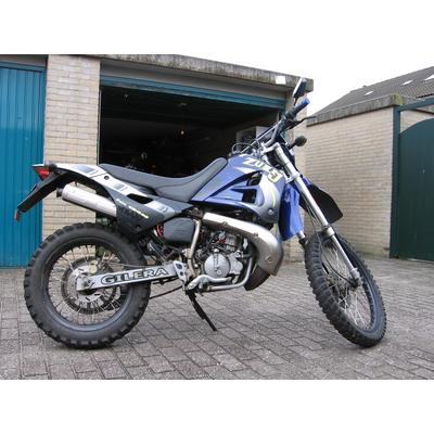 Voor artikel schakels